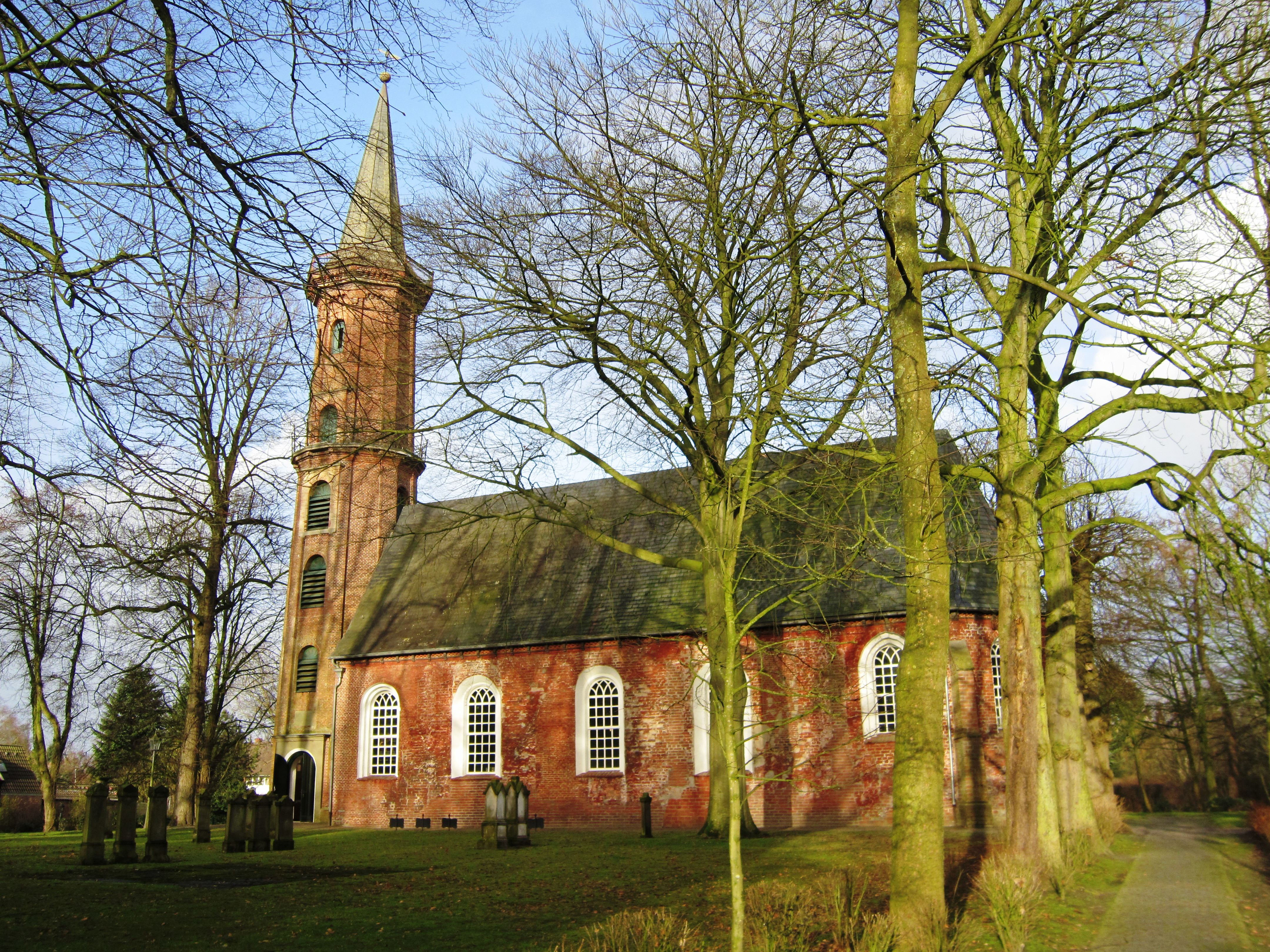 Hervormde kerk (Leer-Loga)